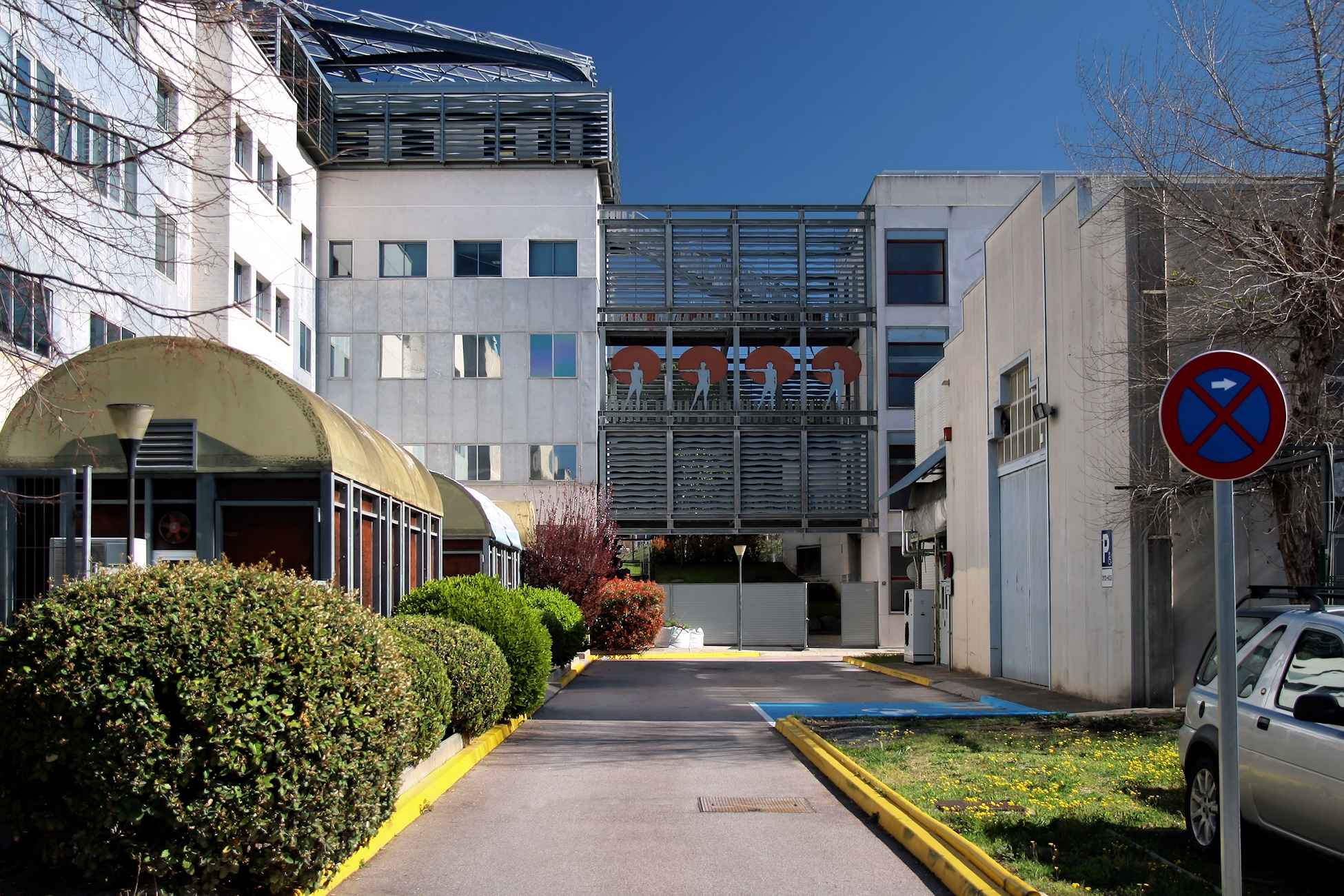 Universitat Autònoma de Barcelona